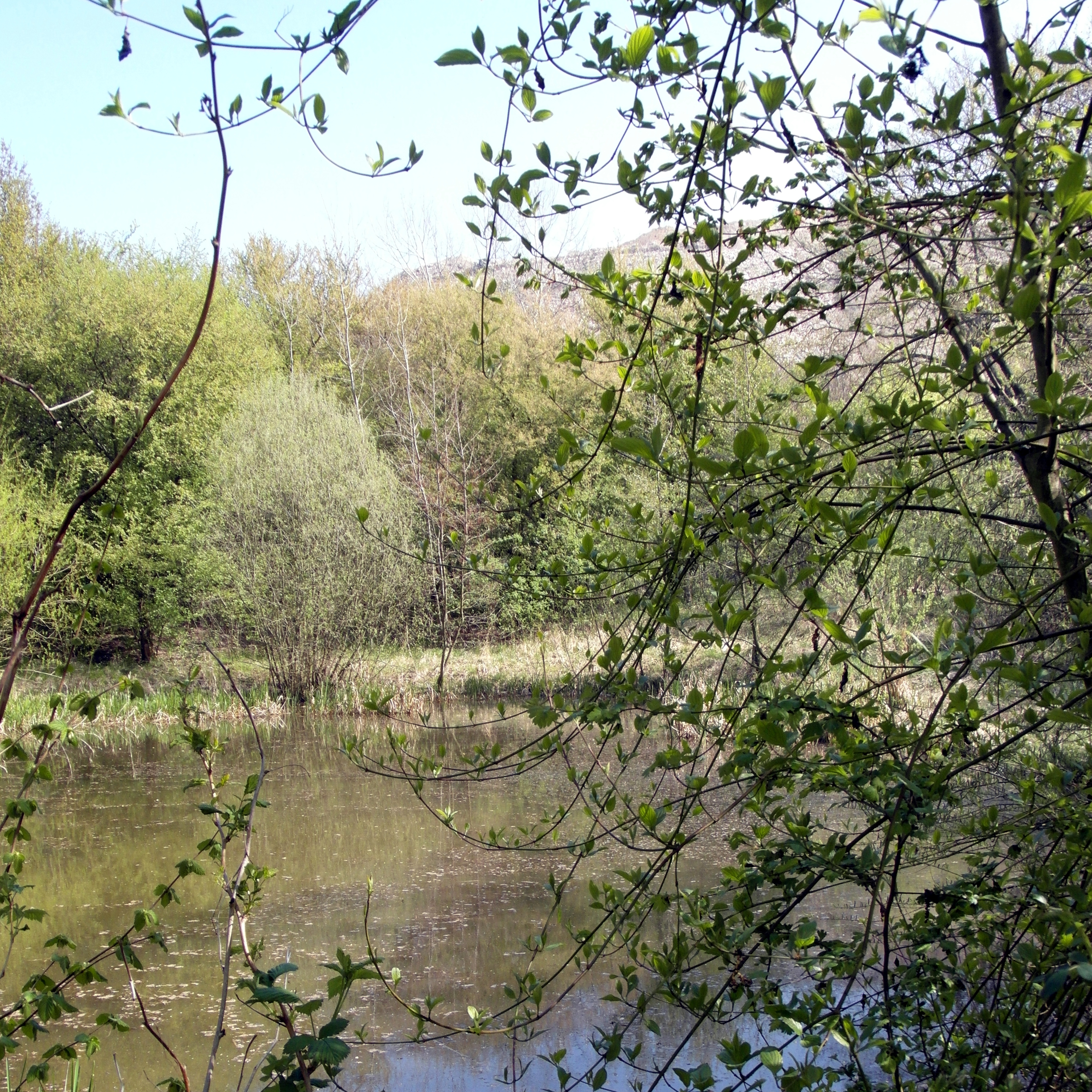 Der Eschteich (ND-H 130) liegt in der Region Hannover zwischen den Ronnenberger Stadtteilen Benthe und Empelde bzw. zwischen dem Benther Berg und der Abraumhalde nahe der Bundesstraße B65